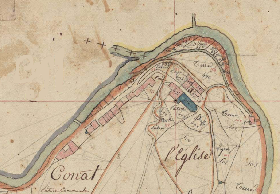 Conat est en el Cadastre napoleònic del 1812 (Arxius Departamentals dels Pirineus Orientals)